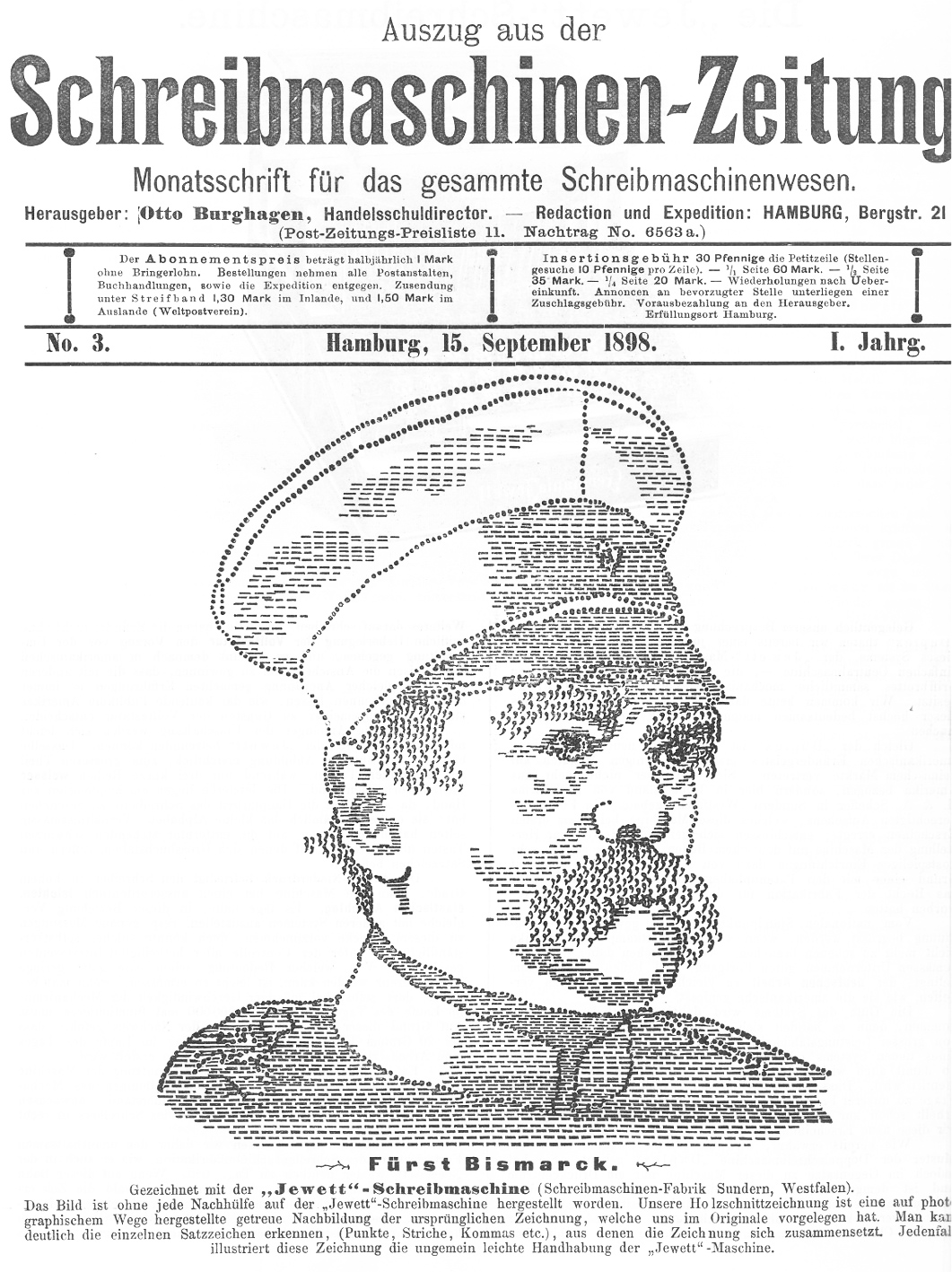 ASCII-Art von Otto von Bismarck. Dieses wurde am 15. September 1898 (sechs Wochen nach seinem Tod) auf der Titelsseite der “Schreibmaschinen-Zeitung” (Jg. 1, Nr. 3 vom 15. September 1898) veröffentlicht.